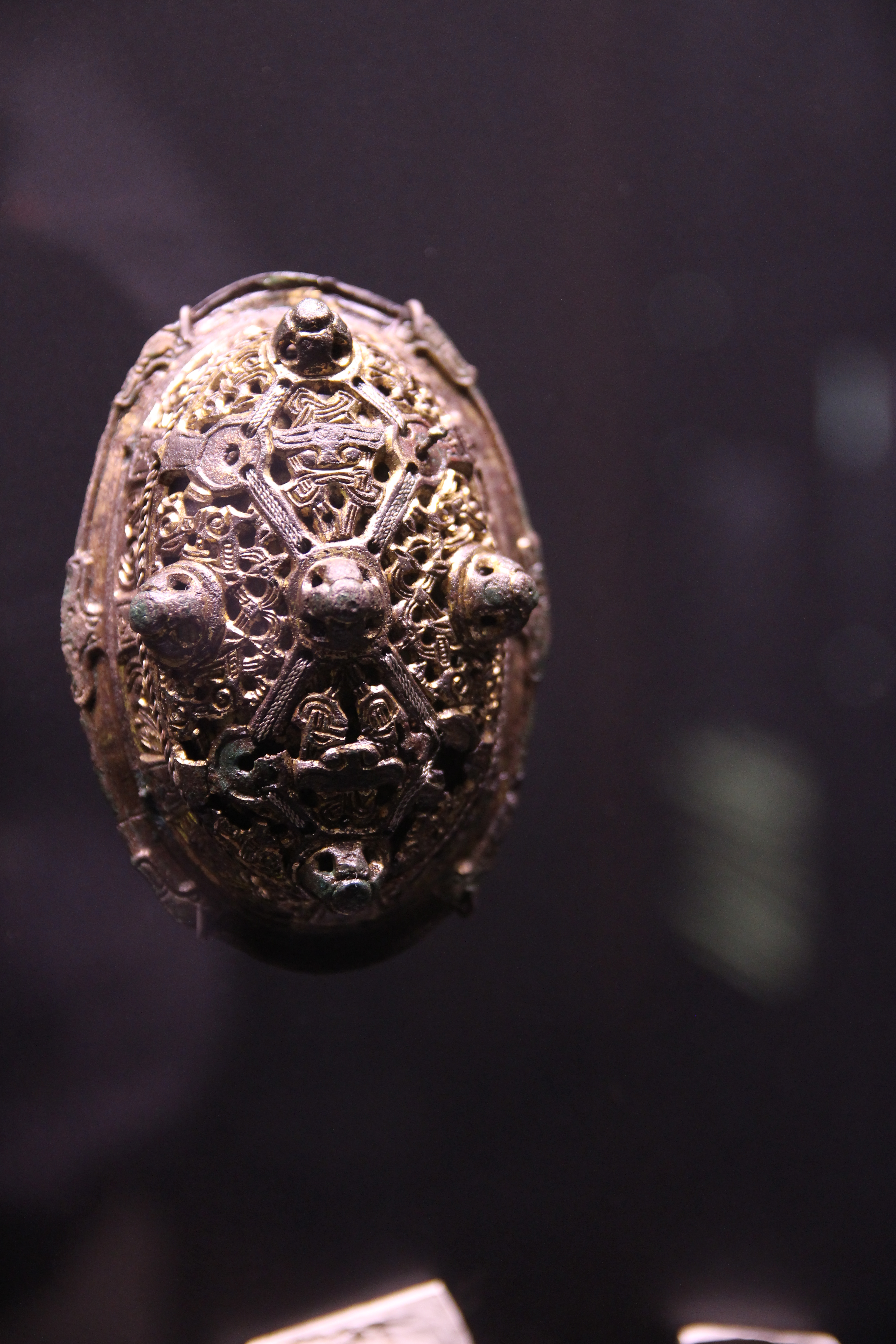 Haithabu bei Schleswig, Museum und Museumsdorf. Gegossene Fibel aus dem 9. oder 10. Jahrhundert.